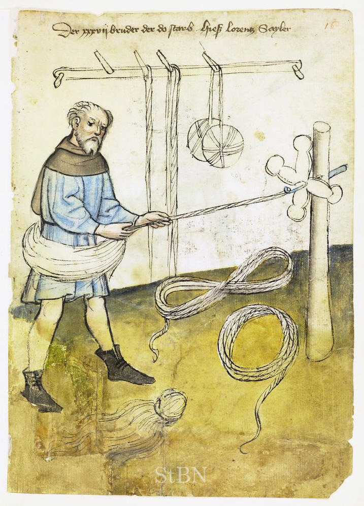 lorentz (Lorenz, Laurentius) Sayler (Sailer; Seiler) , Sayler (Seiler) Transkription und weitere Informationen